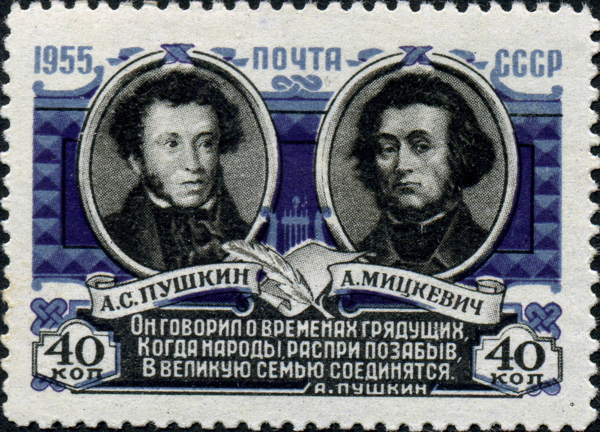 Марка СССР